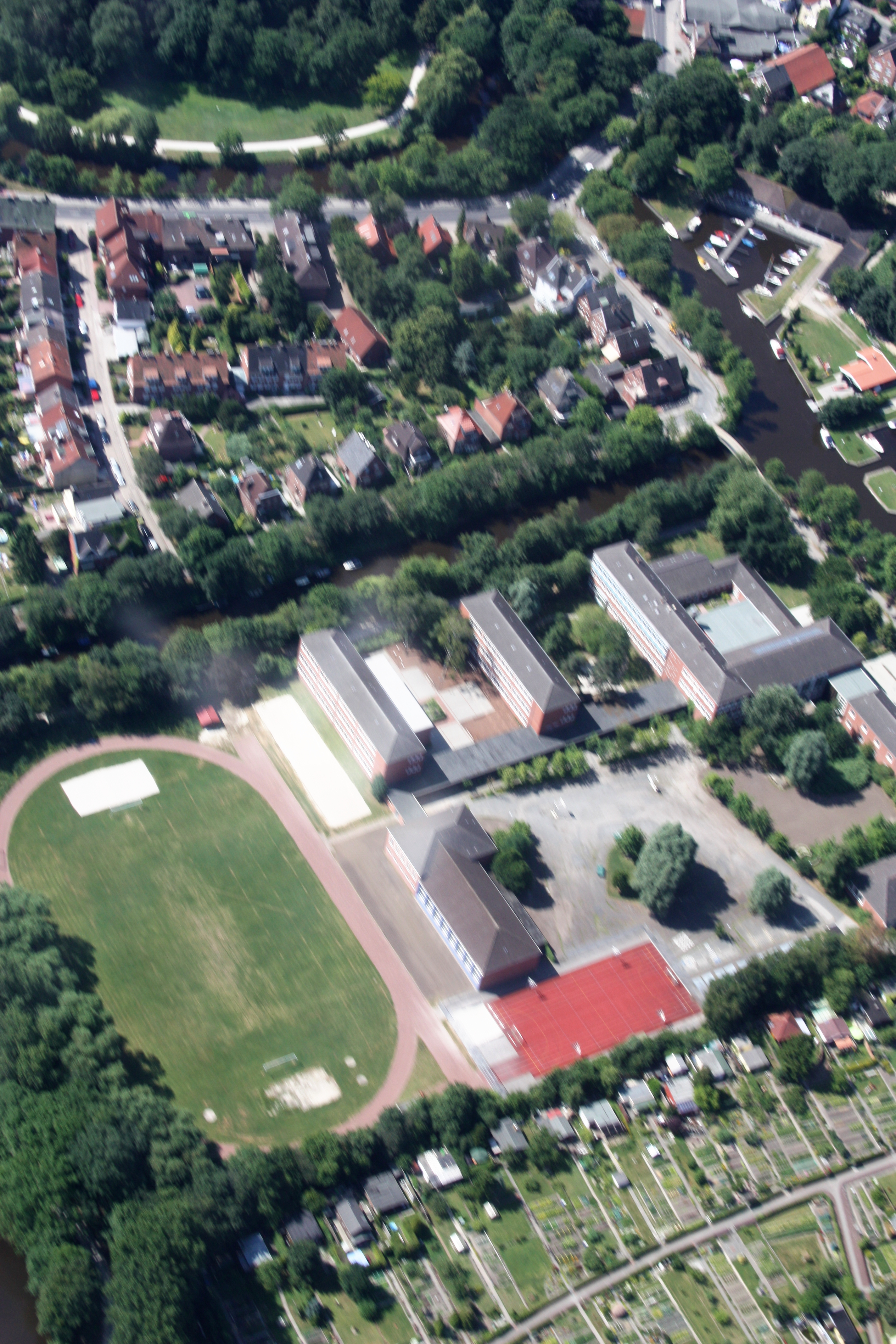 Flug über Emden; Flughöhe 1500 ft; Juli 2010; Originalfoto bearbeitet: Tonwertkorrektur und Bild geschärft mit Hochpassfilter